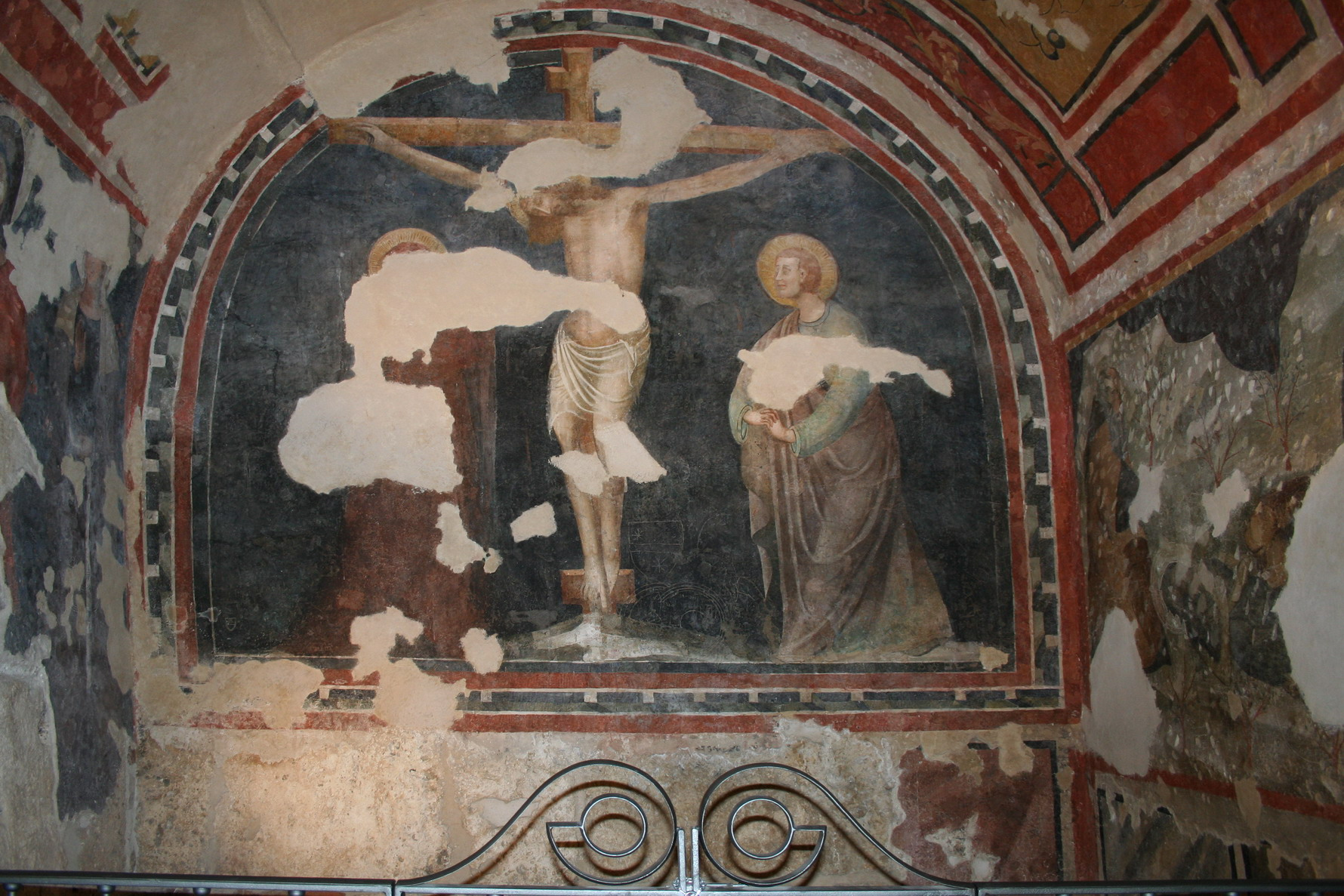 Affresco interno della Cattedrale di Sant'Emidio di Ascoli Piceno.